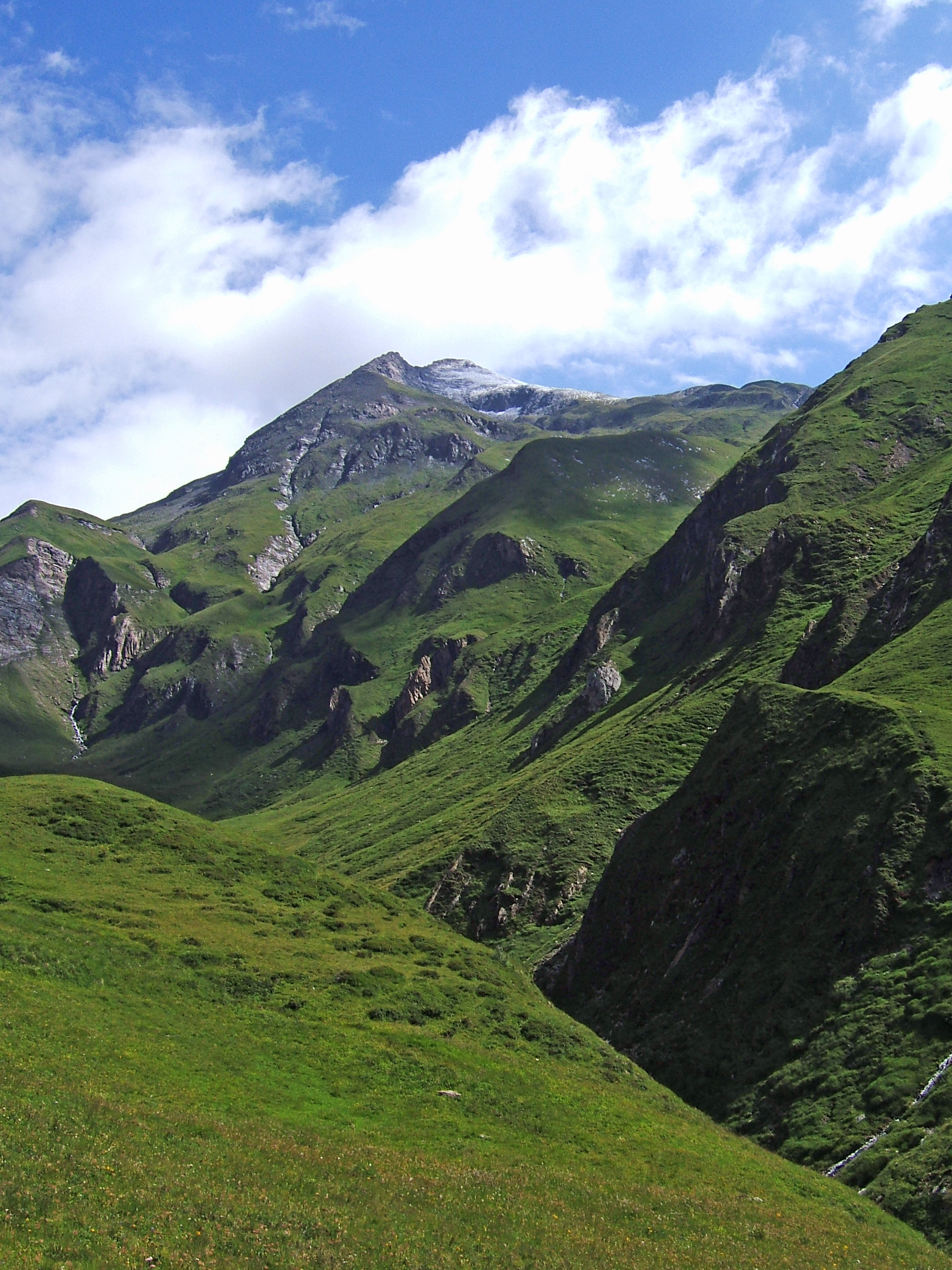 Wurmaulspitze von Südwesten